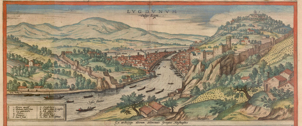 Vue de 1620 montrant la ville de Lyon